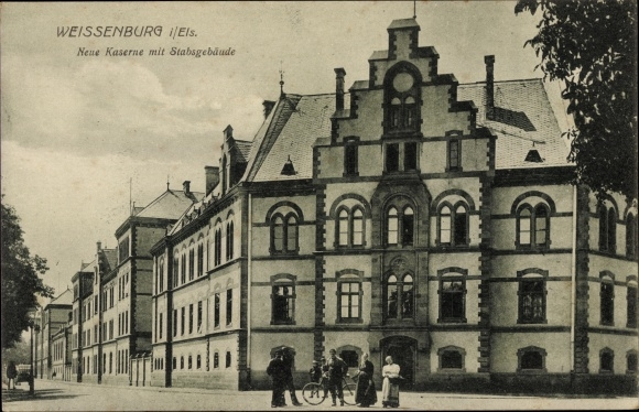 Neue Kaserne in Weißenburg / Elsass, vor 1918 gelaufene Postkarte